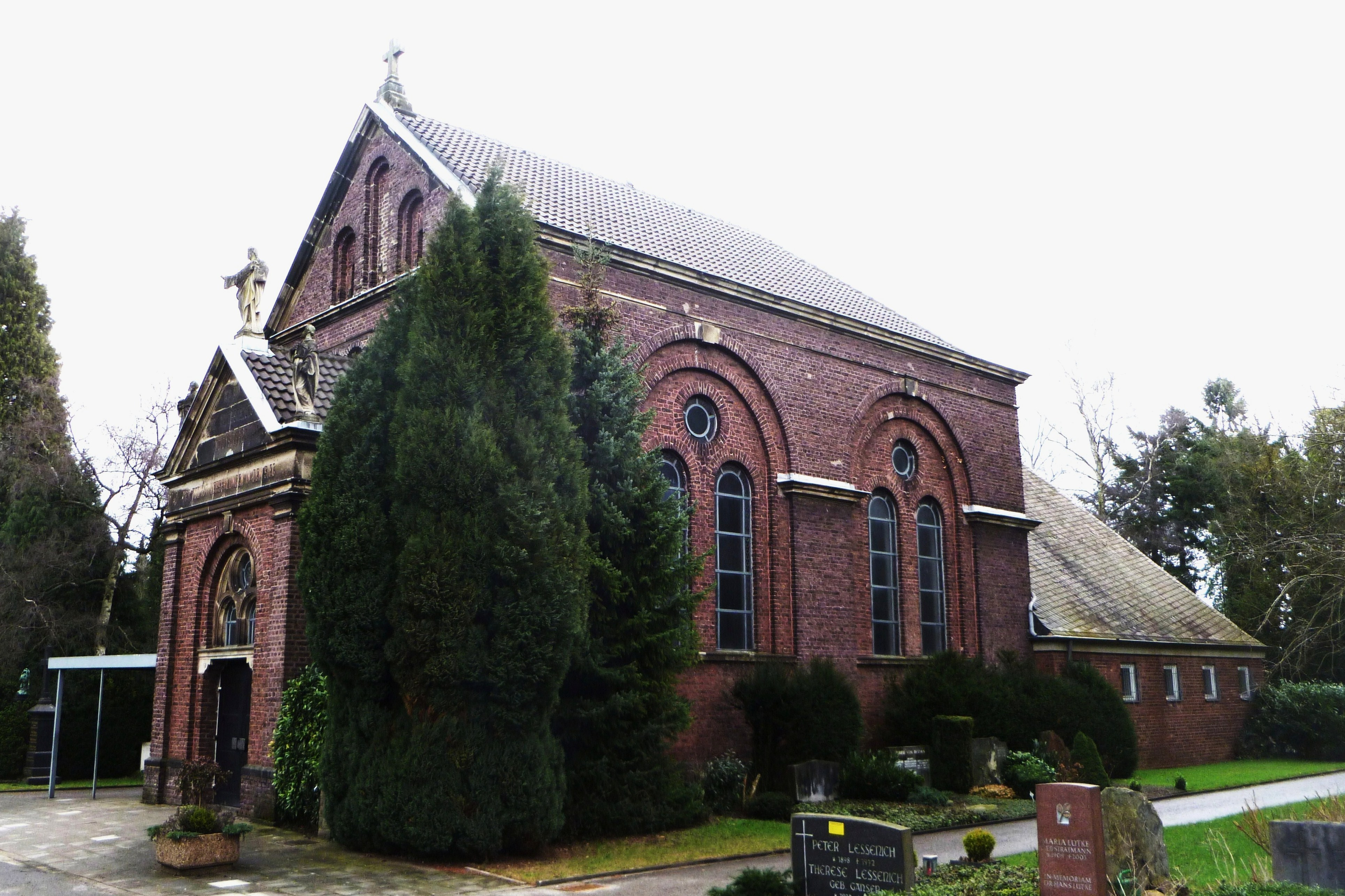 Trauerhalle auf dem Westfriedhof I in Aachen; Baudenkmal in Aachen